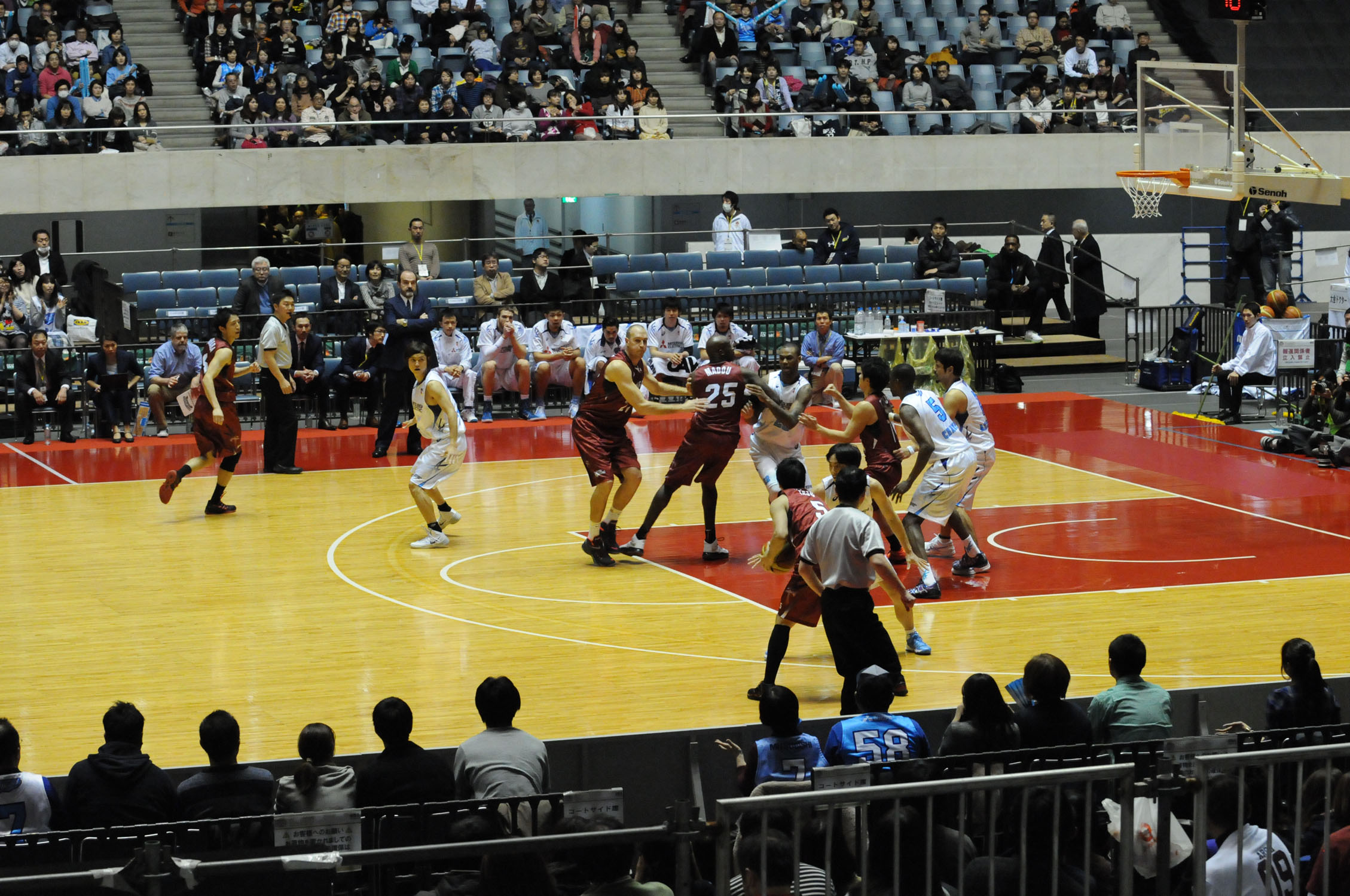 2015年全日本総合バスケットボール選手権大会準々決勝、三菱電機ダイヤモンドドルフィンズ名古屋対東芝ブレイブサンダース神奈川。代々木第一体育館で。